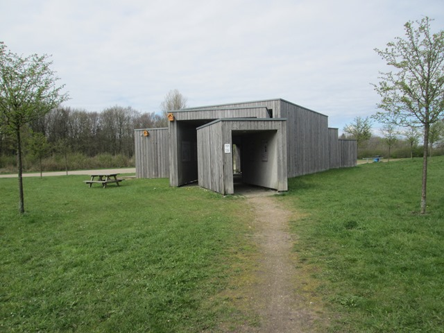 Arnkielparkens info-pavillon i Munkvolstrup